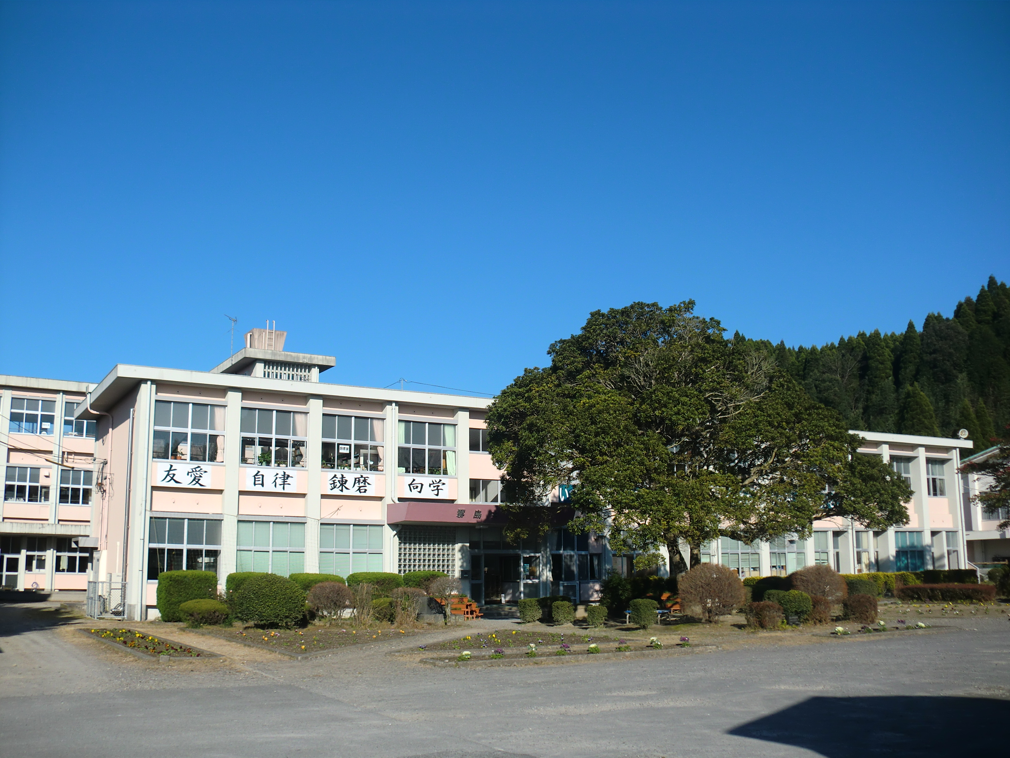 霧島市にある霧島市立霧島中学校